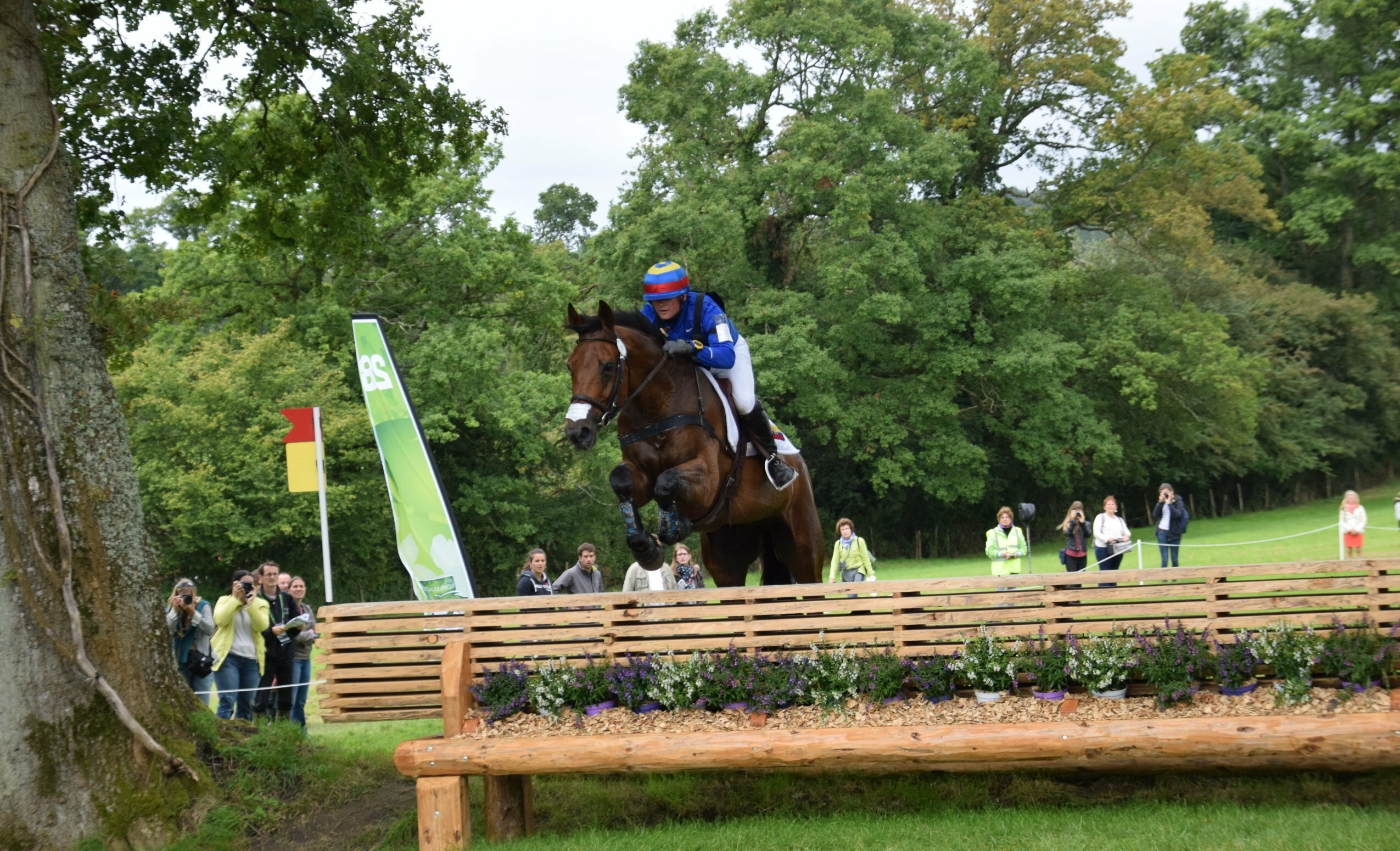 JEM 2014 : Nicolas Wettstein et Nadeville Merze sur le cross du concours complet